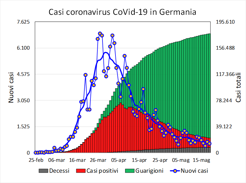 Andamento giornaliero dei casi relativi alla pandemia di COVID-19. Sono evidenziati decessi, guarigioni, casi attivi e nuovi casi giornalieri.